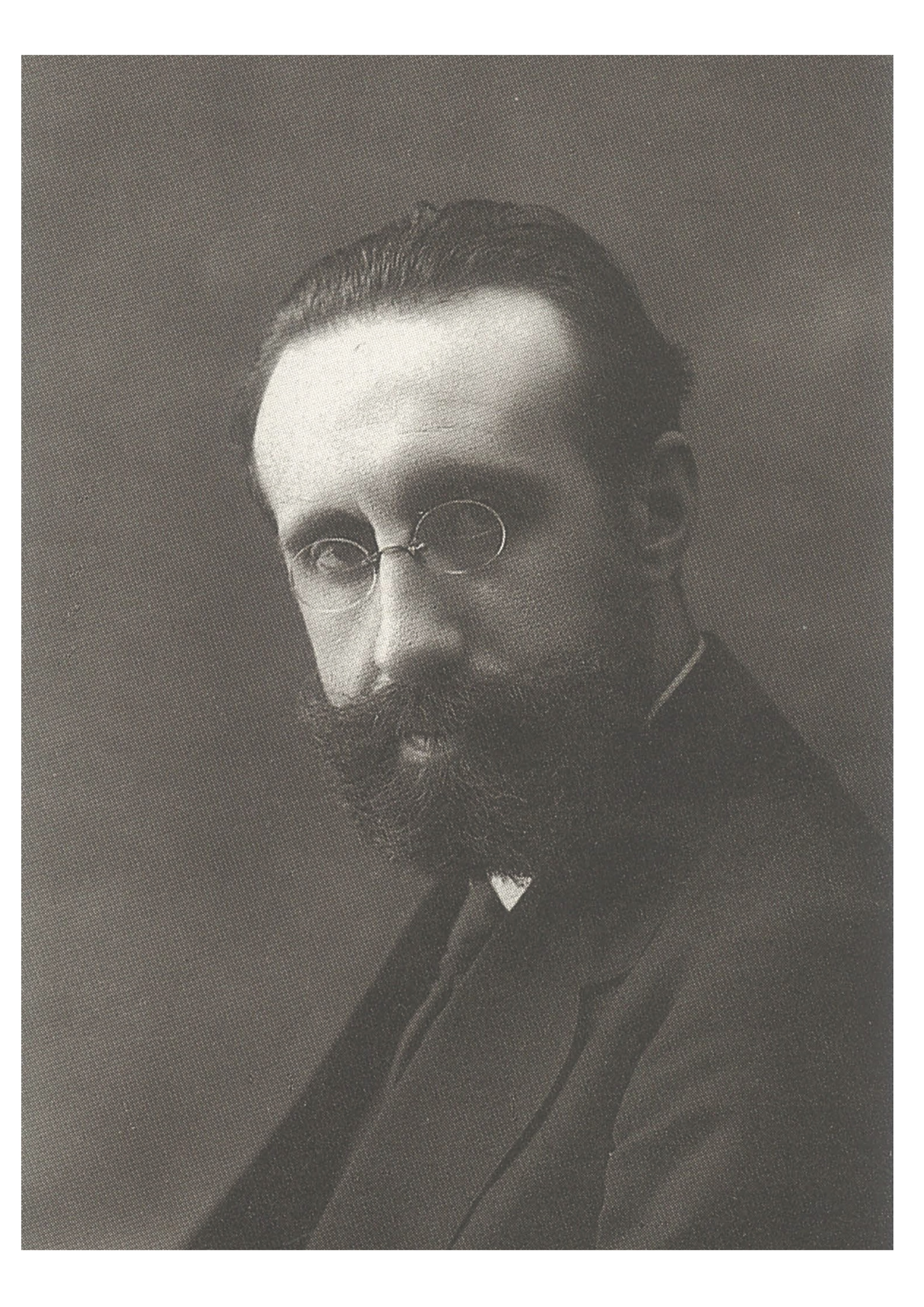 Conrado del Campo